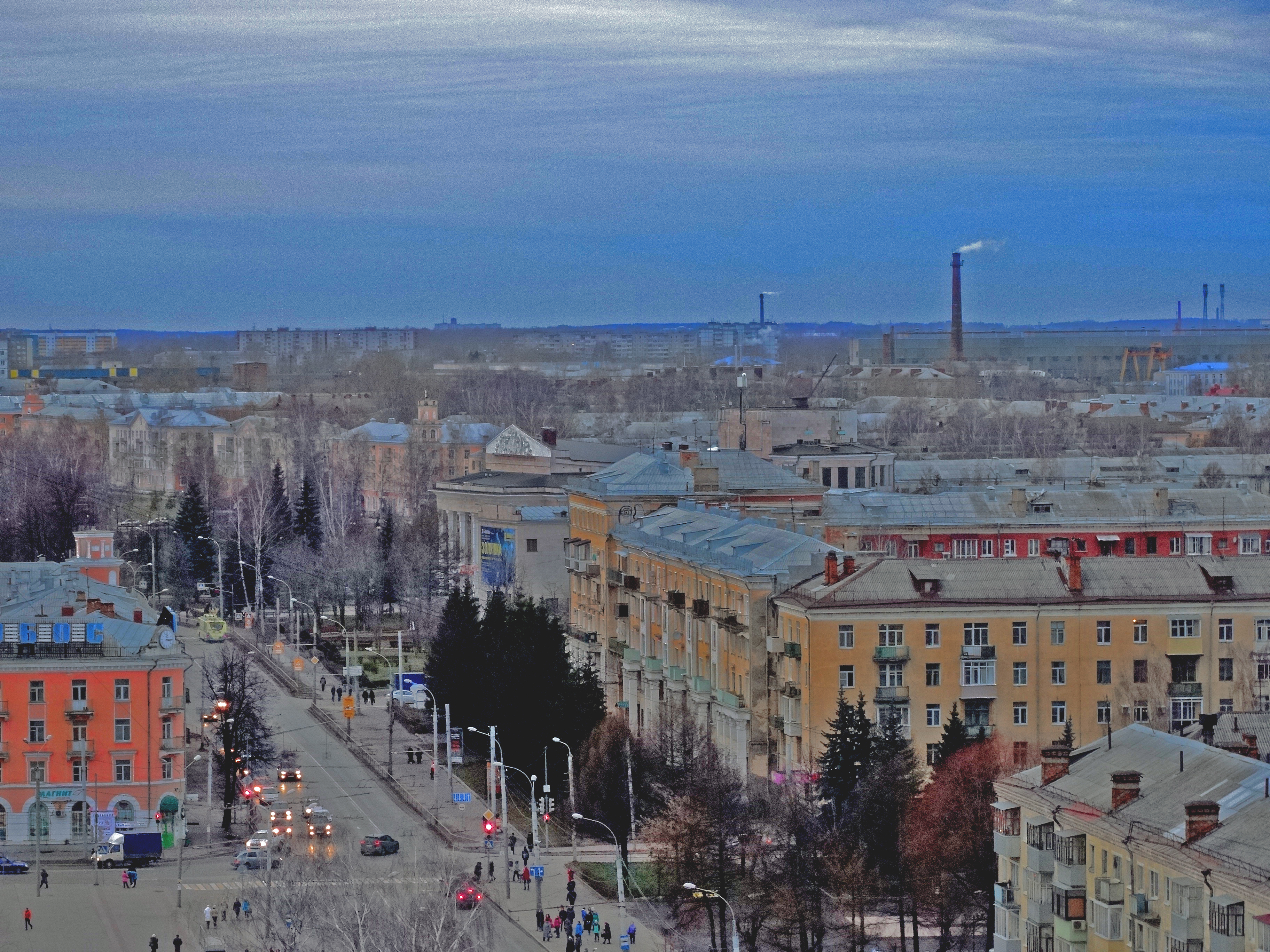 Западная часть города